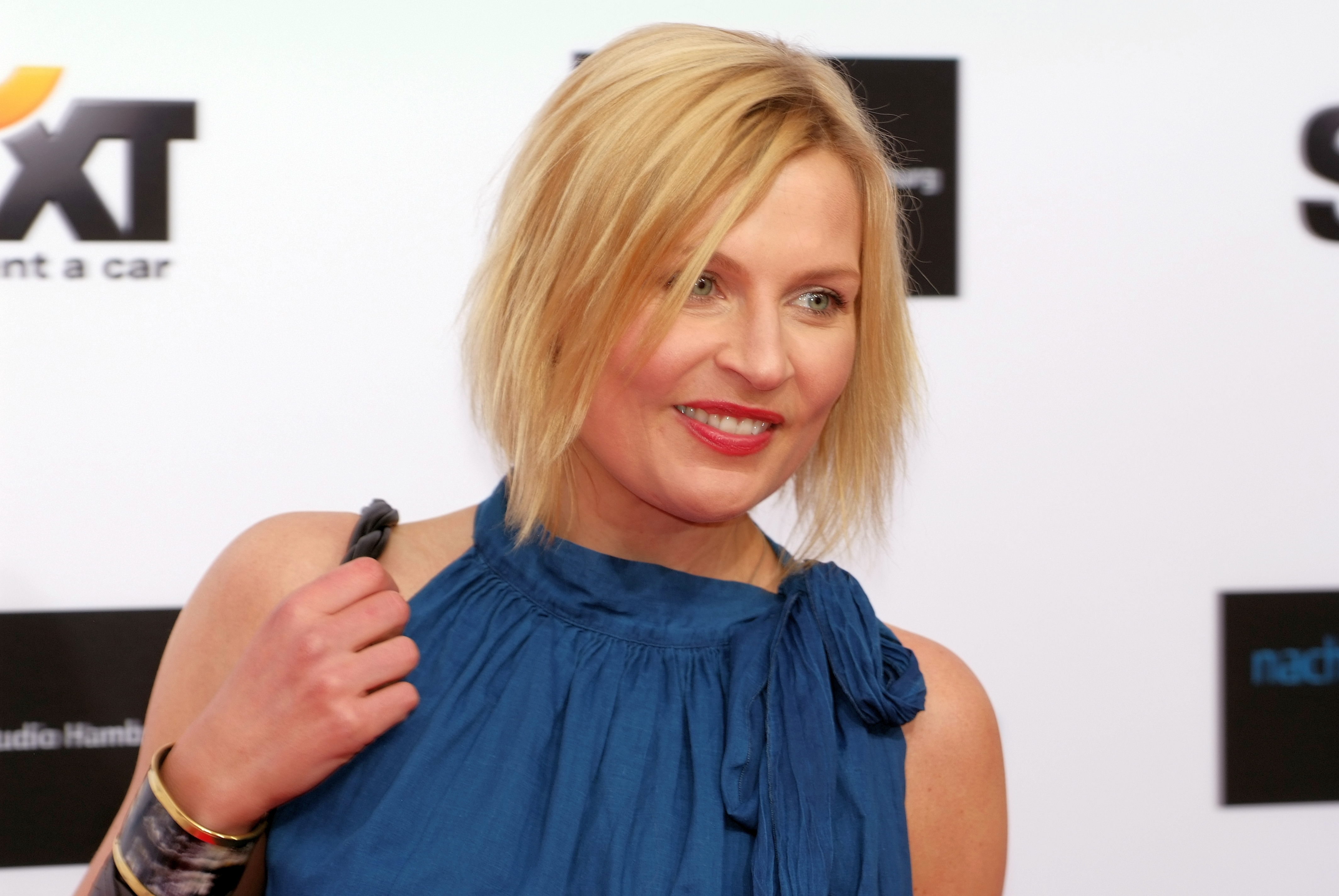 Schauspielerin Sanna Englund beim Studio Hamburg Nachwuchspreis 2012